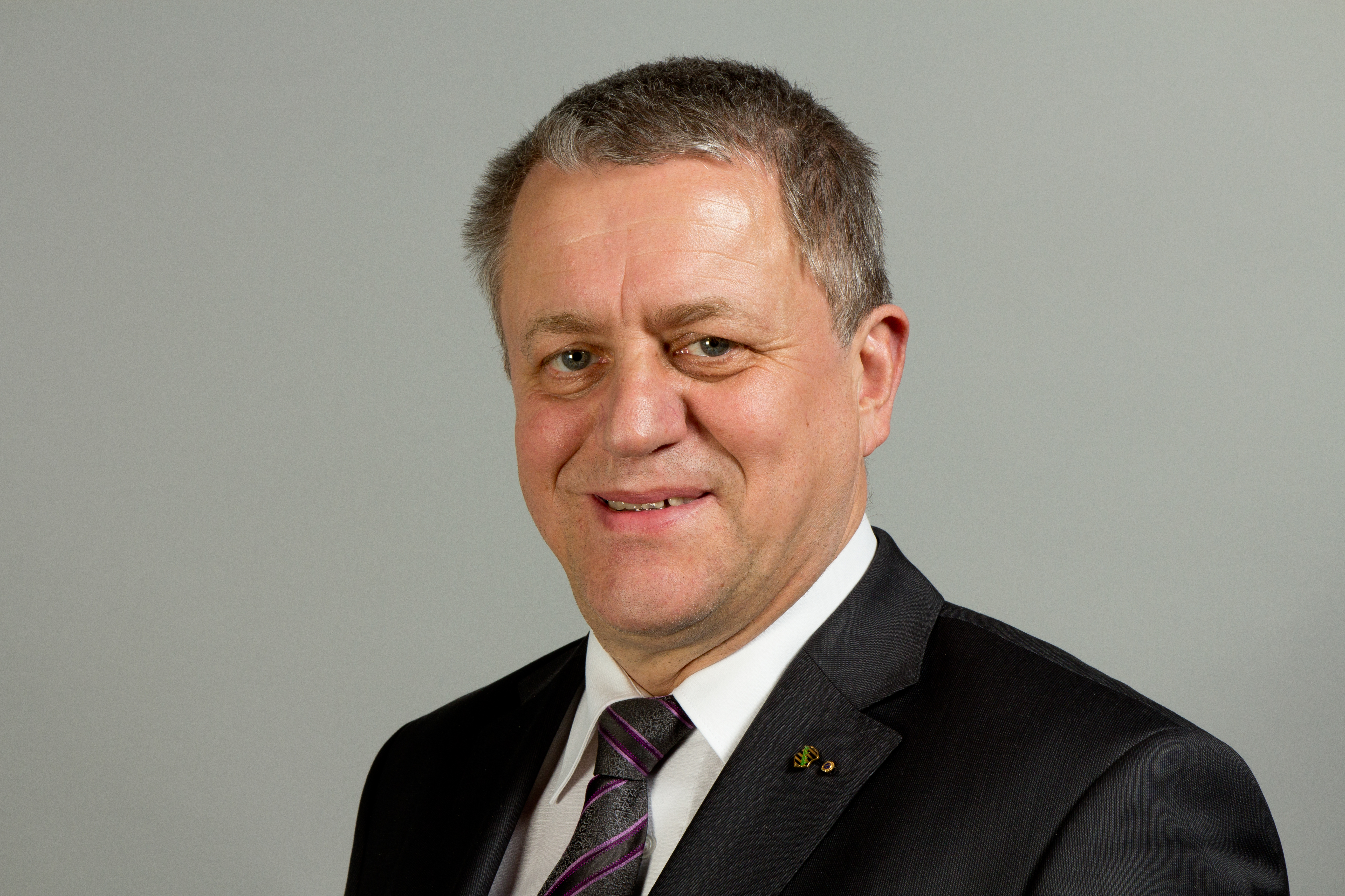 Lothar Bienst (* 26. Oktober 1956 in Teicha) ist ein deutscher Politiker (CDU). Im Jahr 2009 zog er in den Landtag von Sachsen ein. Wikipedia im Landtag – Sachsen 17. bis 18. Dezember 2013 in DresdenDieses Foto wurde im Rahmen des Projektes „Wikipedia im Landtag“ erstellt. Fragen zur Nachnutzung Wenn Sie Fragen zur Nachnutzung dieses Bildes haben, können Sie sich jederzeit gern an wenden